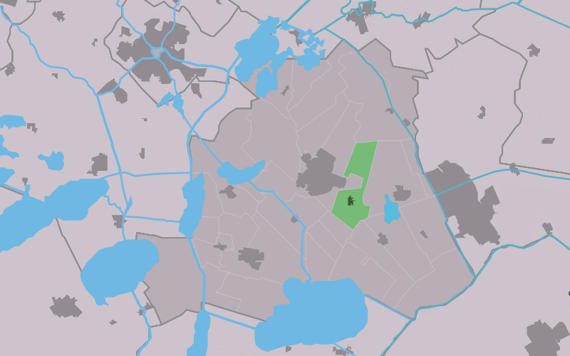 Kaartsje fan himrik fan Haskerhoarne